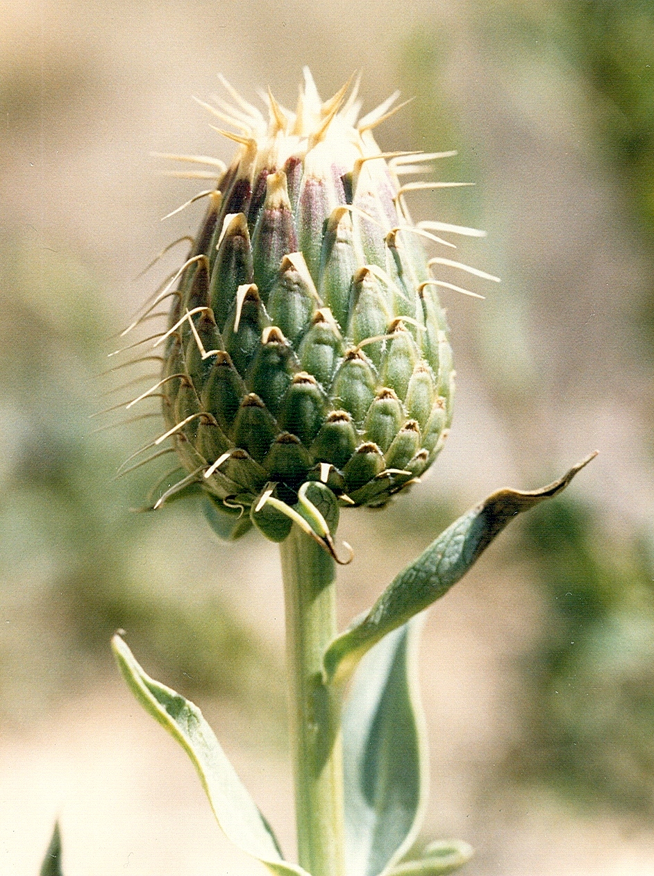 Klasea flavescens - Capítulo en preantesis - La algüeda, Albatera (Alicante, España).